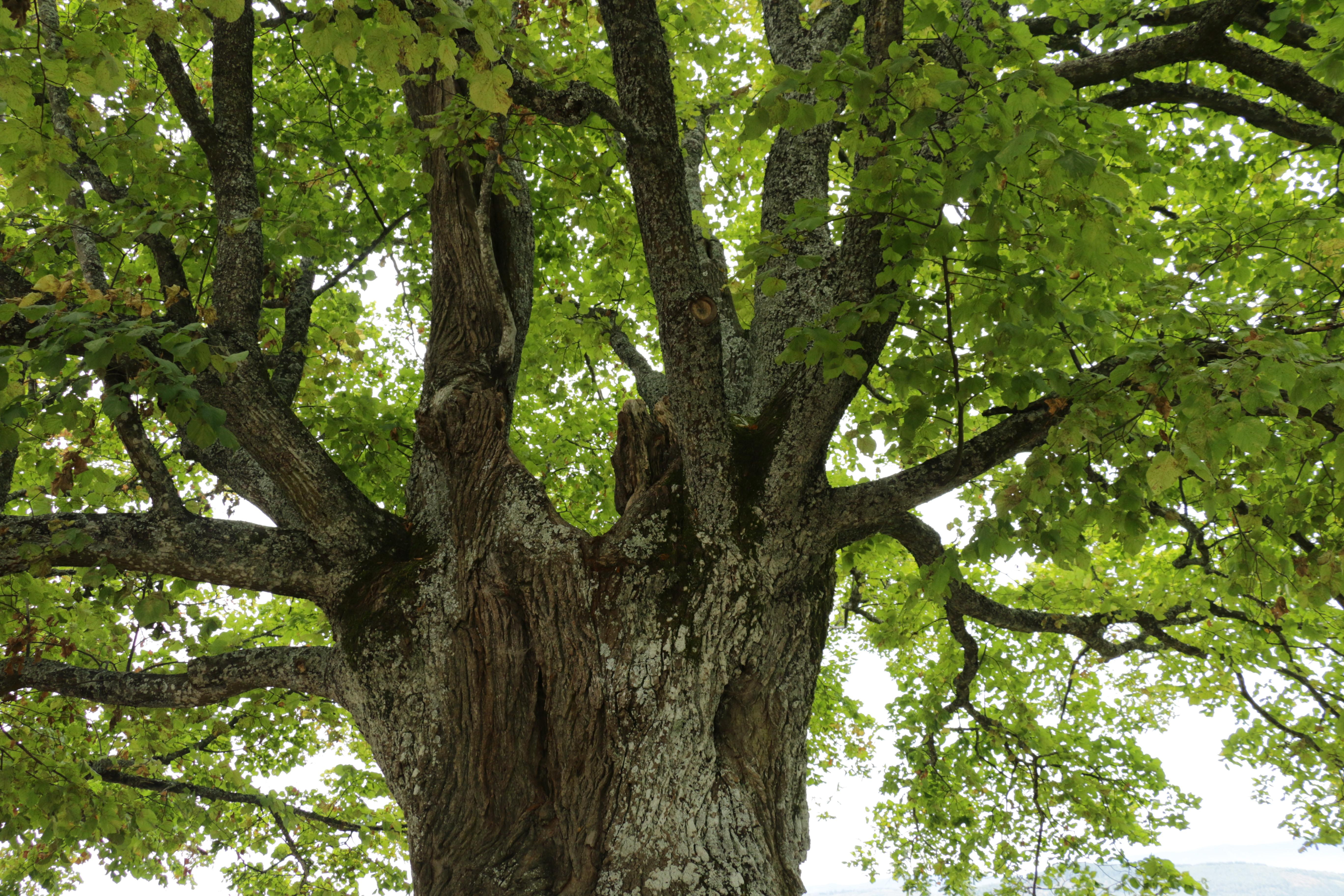 Mont Sainte Odile im Elsaß, alte Linde.